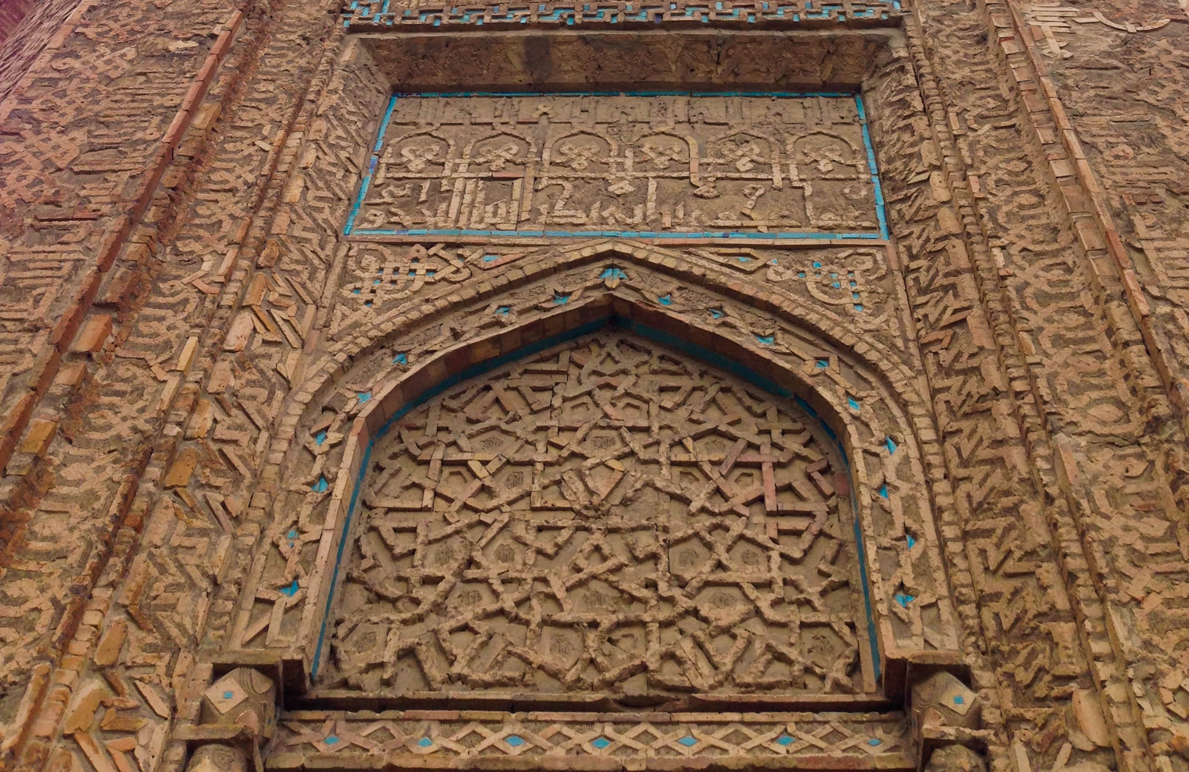 Mömünəxatun türbəsinin giriş portalı